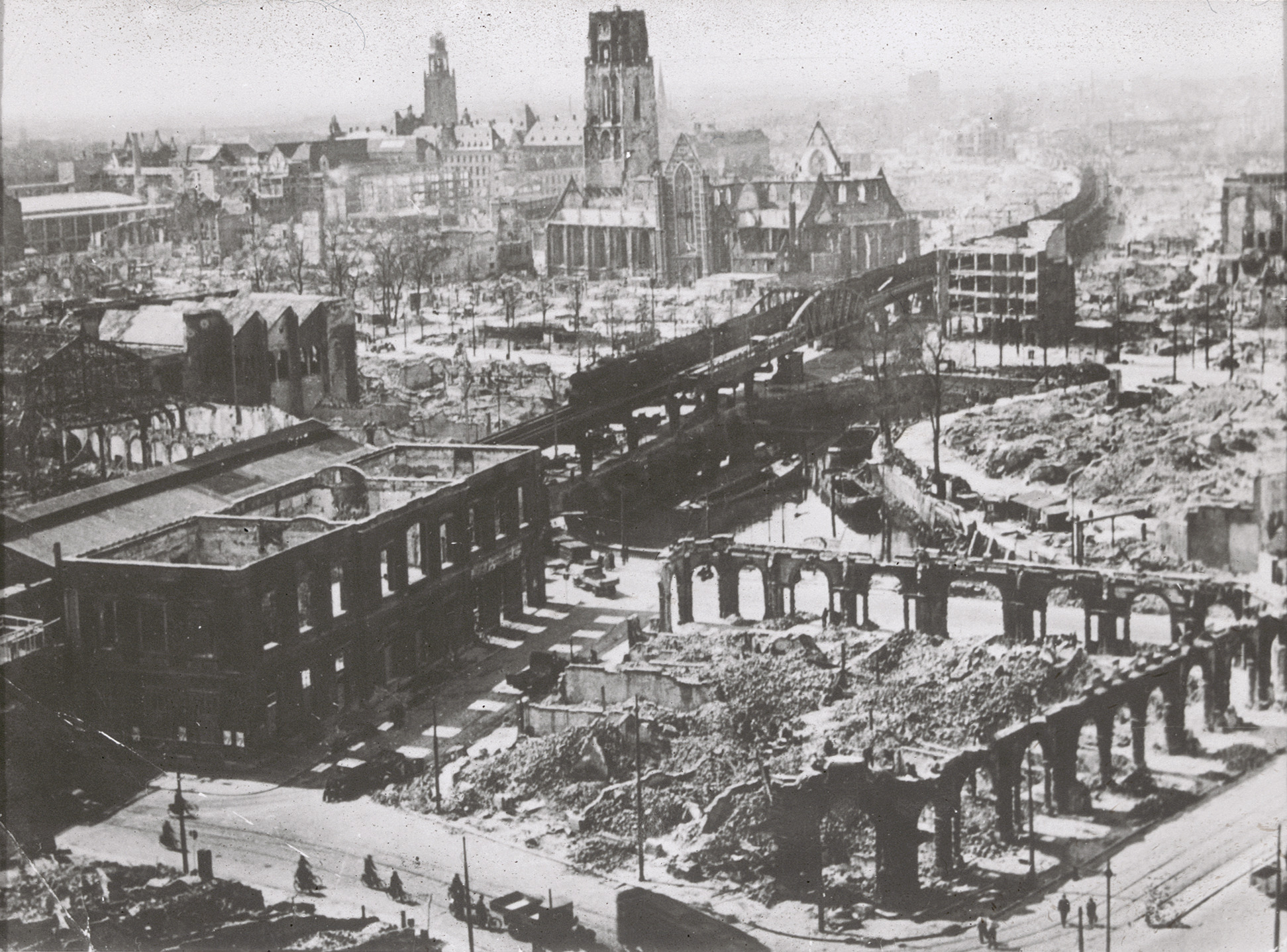 Exterieur OVERZICHT NA BOMBARDEMENT (OORLOGSSCHADE)